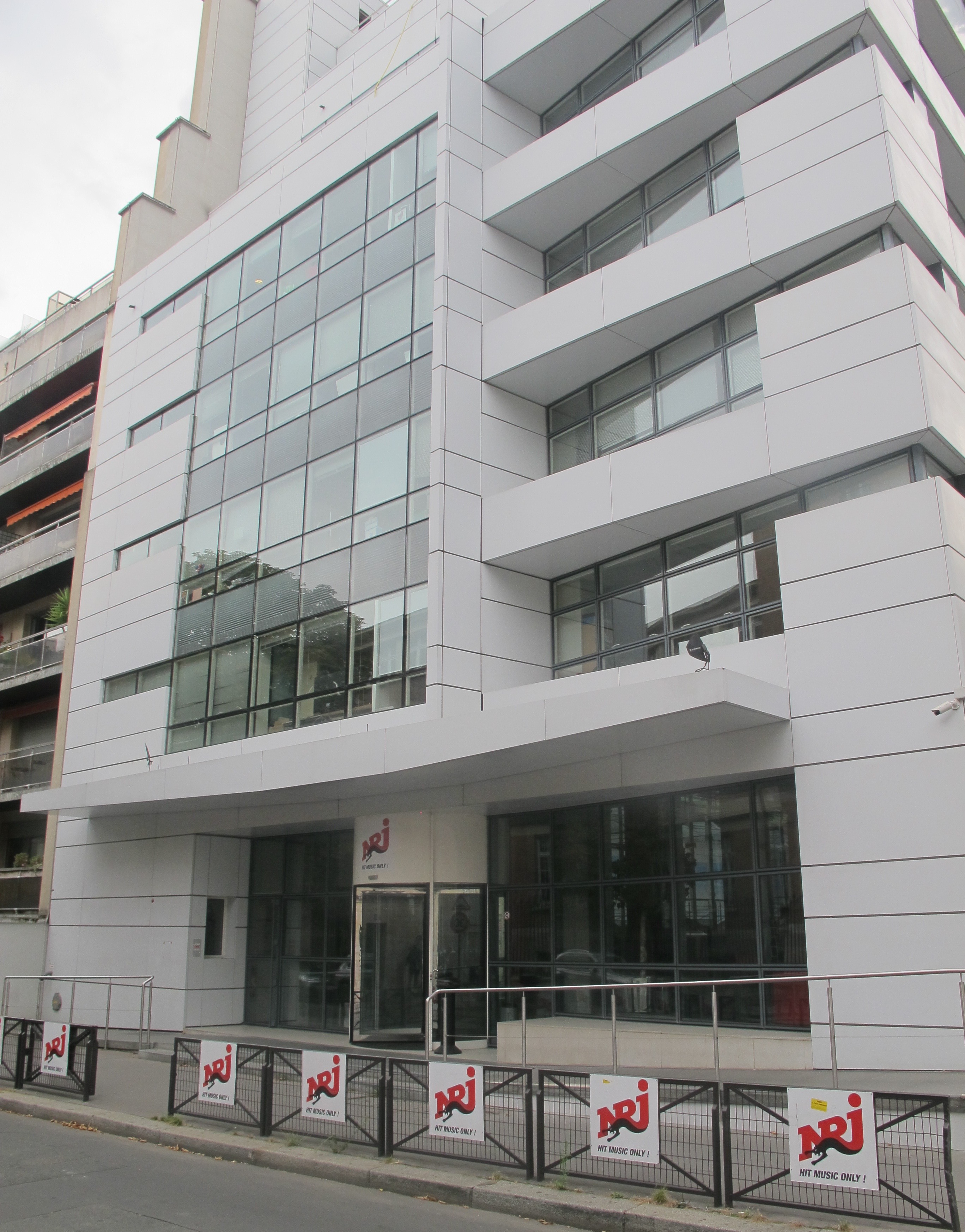 Siège de NRJ, 22 rue Boileau (Paris, 16e).